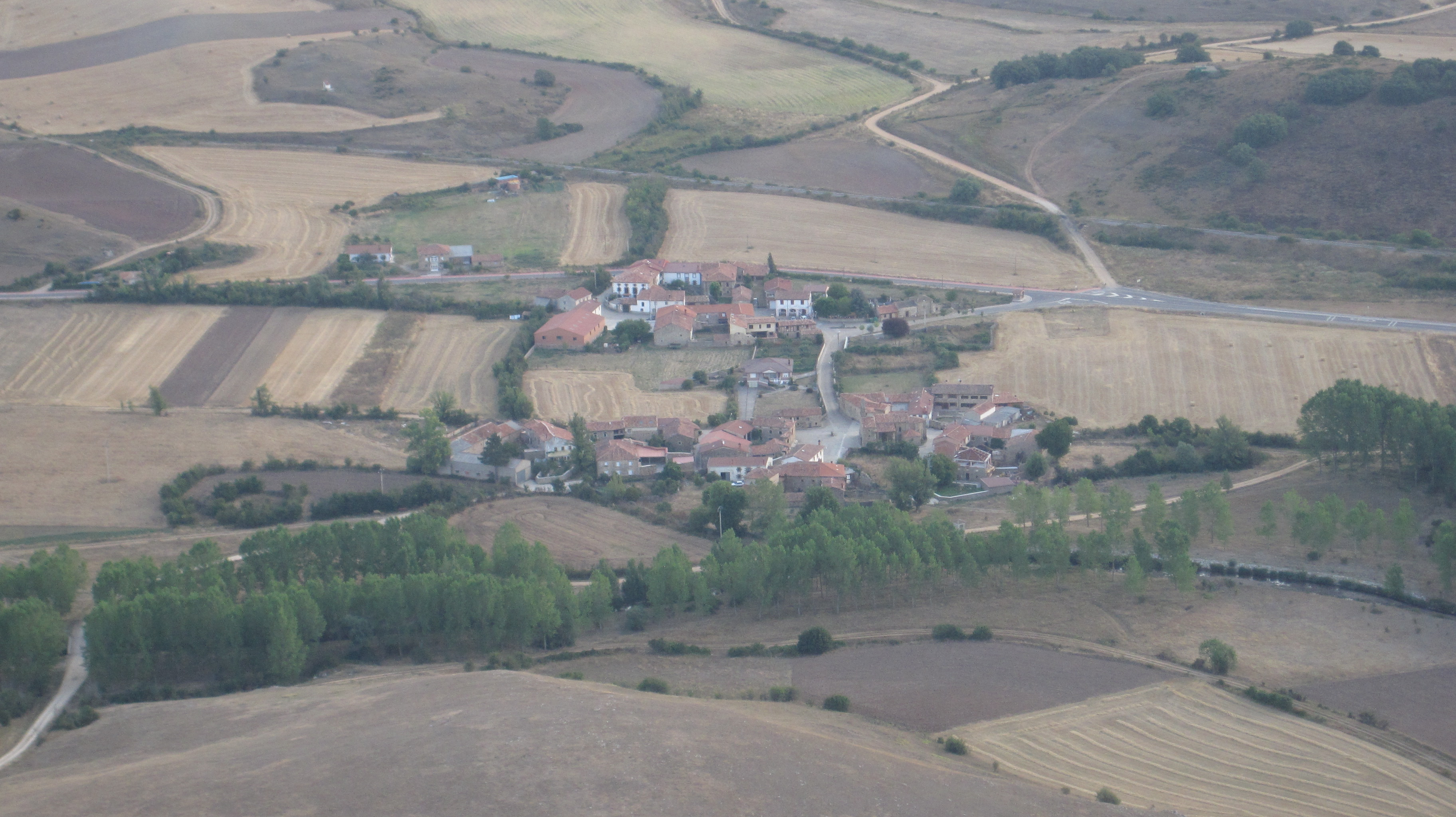 Vista aérea de Villavega de Aguilar (Aguilar de Campoo, Palencia, España).